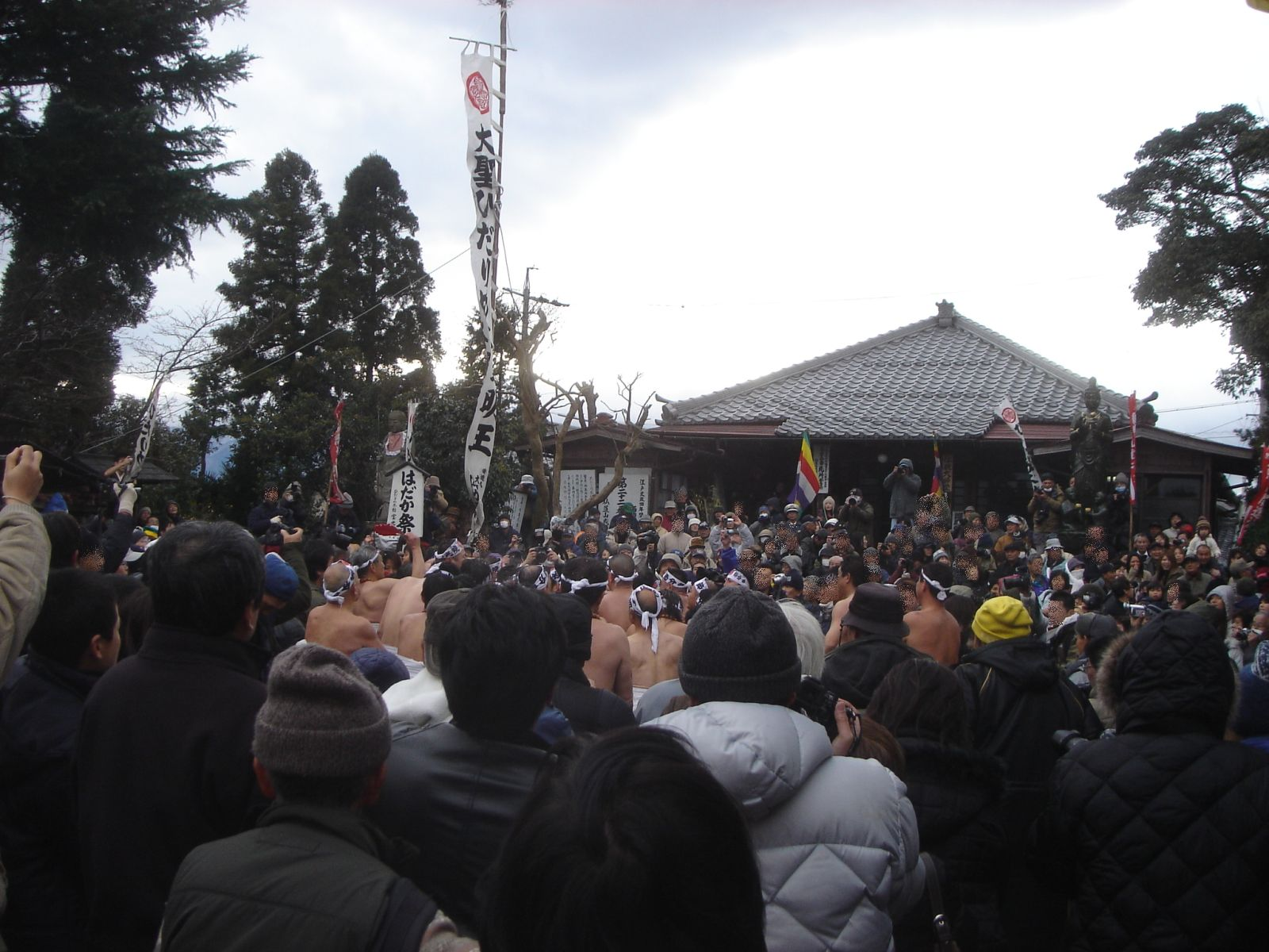 Houkouin Setsubun-e （宝光院 (大垣市)の節分会）,Ogaki,Gifu,Japan(岐阜県大垣市)で撮影。